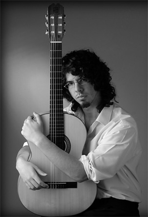 Fotografía del poeta David Fernández Rivera (2004)